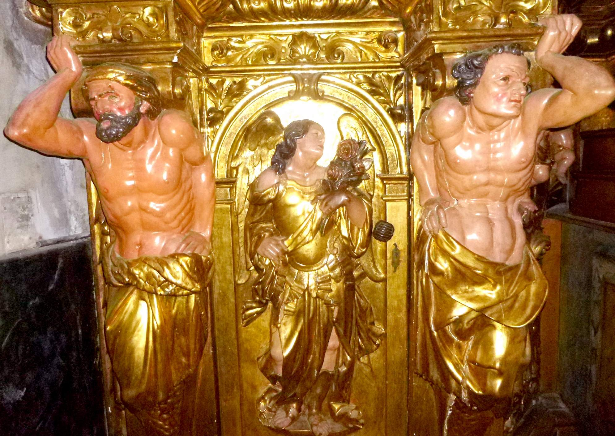 Basílica de Santa María de Mataró (provincia de Barcelona).